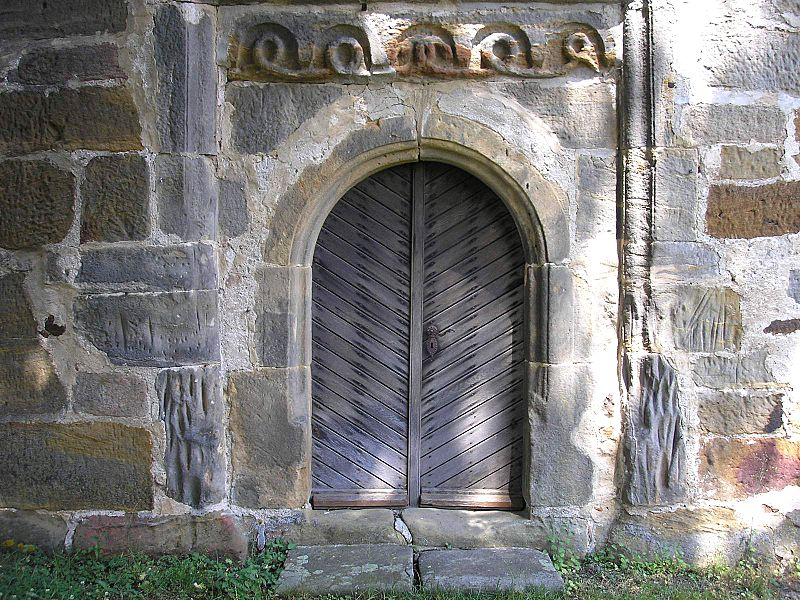 Obermerzbach (Landkreis Haßberge, Unterfranken) / Obermerzbach, Lower Franconia, Germany. Filialkirche St. Michael, Portal / Entrance to the church St. Michael. Eigene Aufnahme, Juni 2006 / Own photo, June 2006